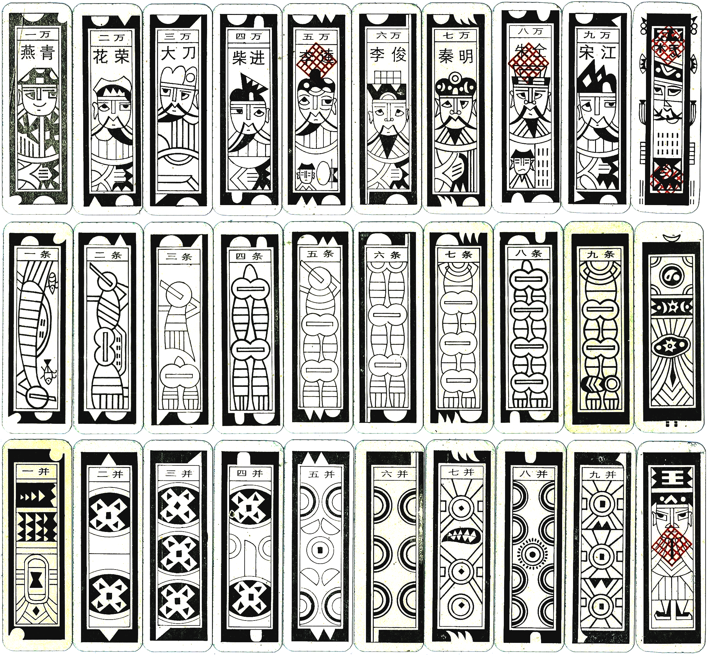 中文（台灣）: 曹州的紙牌